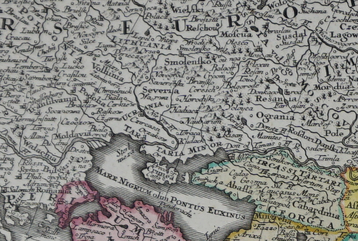 Фрагмент Європейської частини карти "Asia cum omnibus Imperiis, Provinciis, Statibus et Insulis iuxta observationes recentissimas et accuratissimas correcta et adornata". Бібліотека Софійського університету (Токіо, Японія)